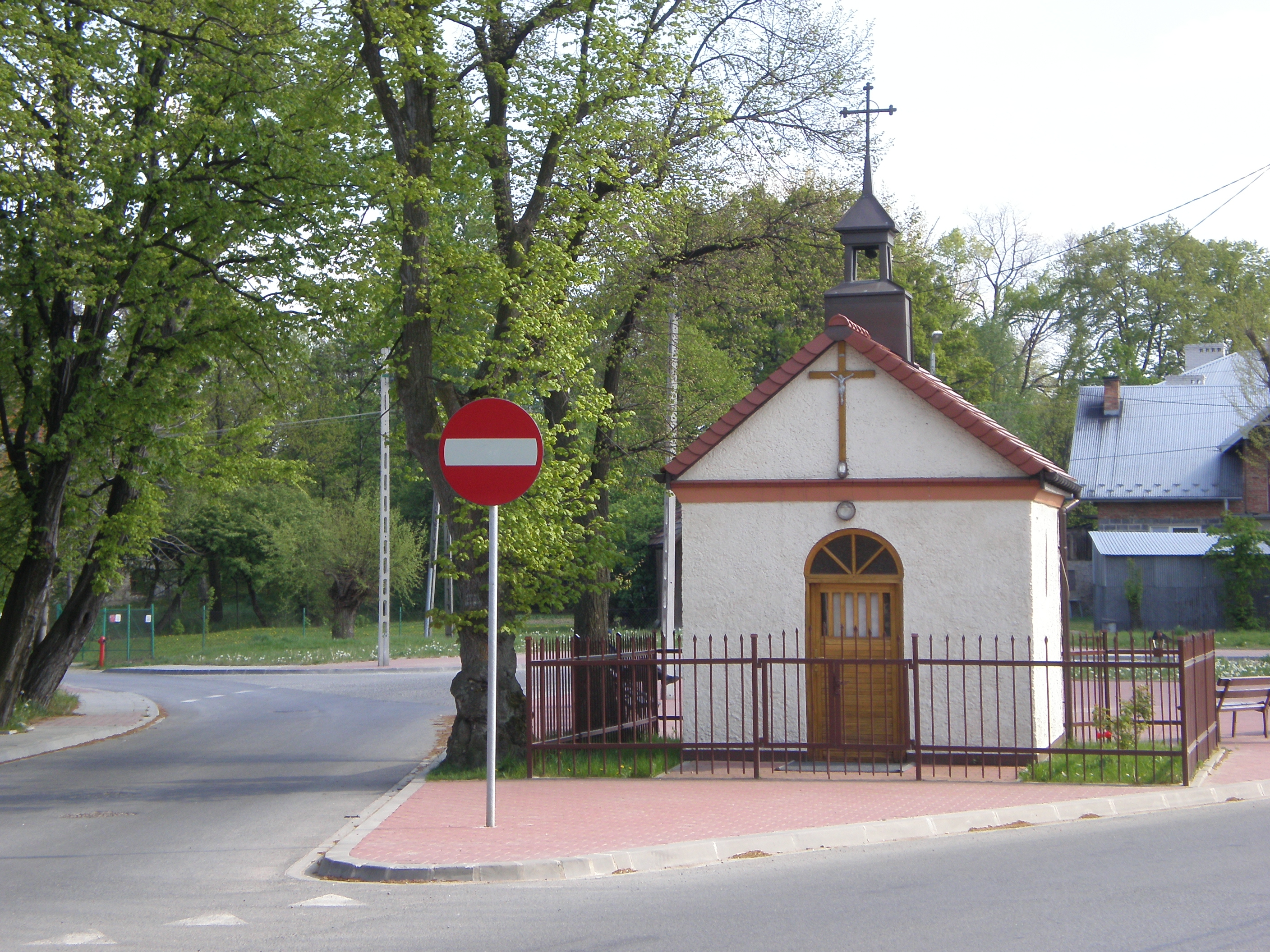 Soboniowice, kapliczka